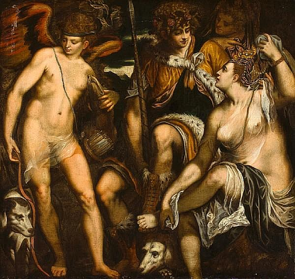 картина Венера, Адоніс і дорослий Амур з рилами